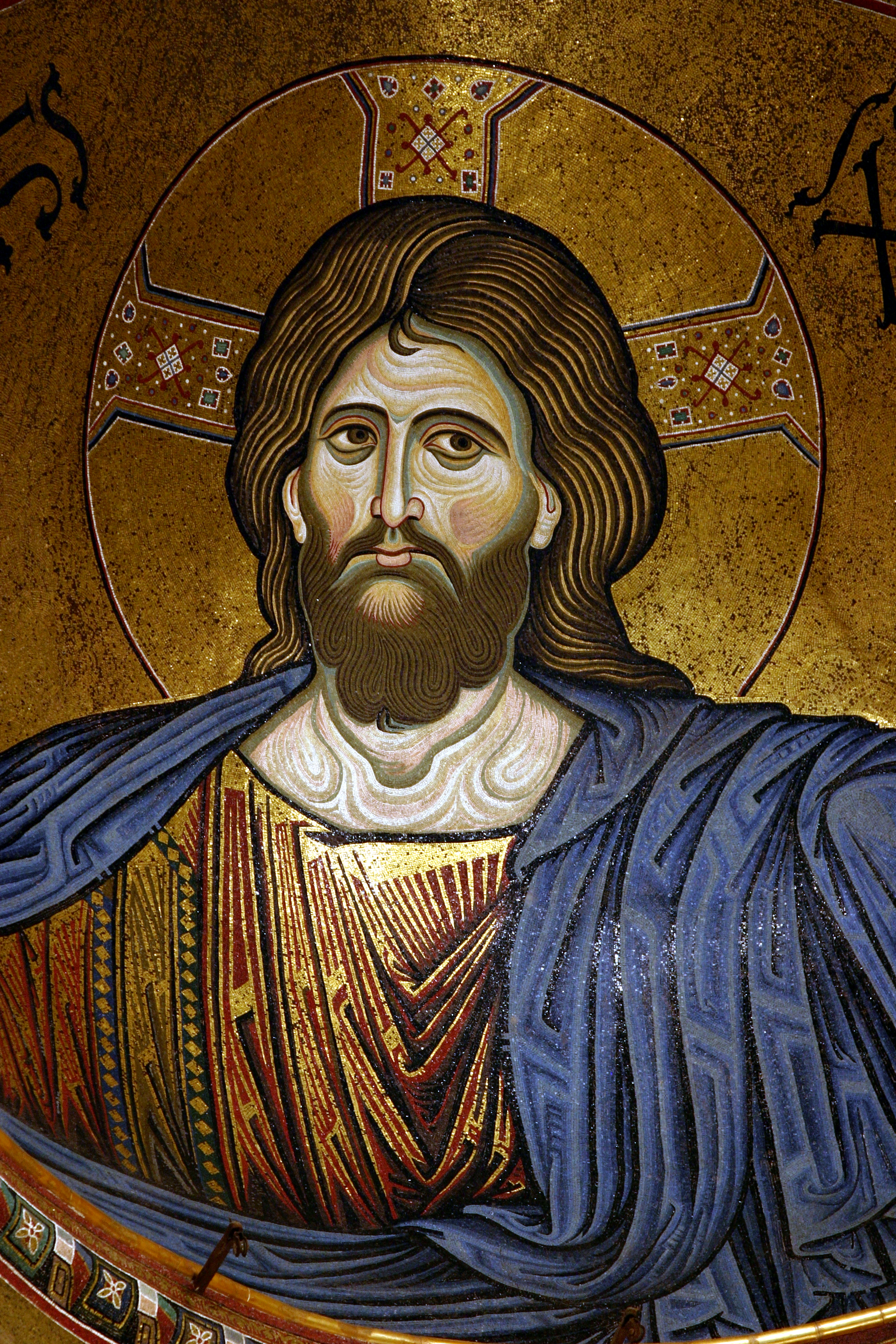 Cathedral of Monreale